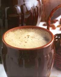 Квас (Kvass)